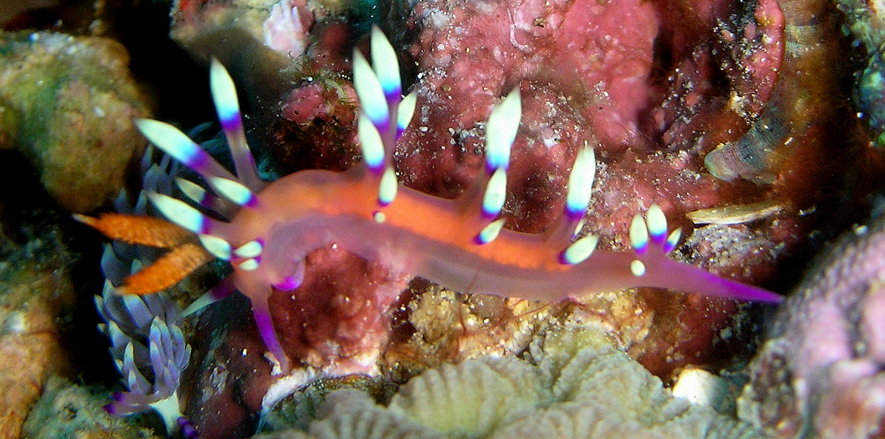 Flabellina marcusorum Gosliner & Kuzirian, 1990